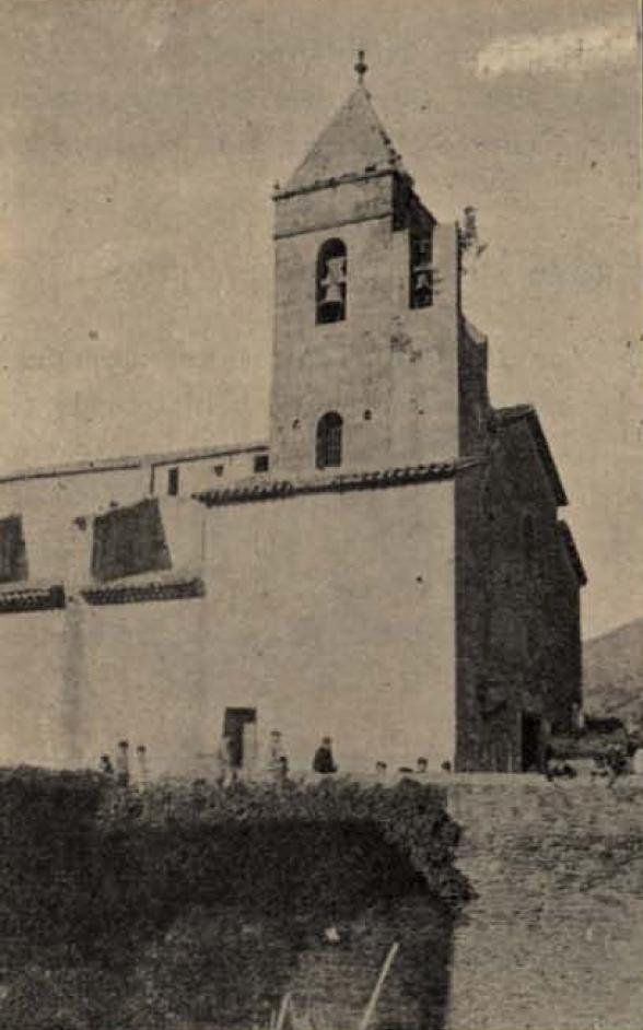 Església parroquial de Sant Climent (Sant Climent de Llobregat)